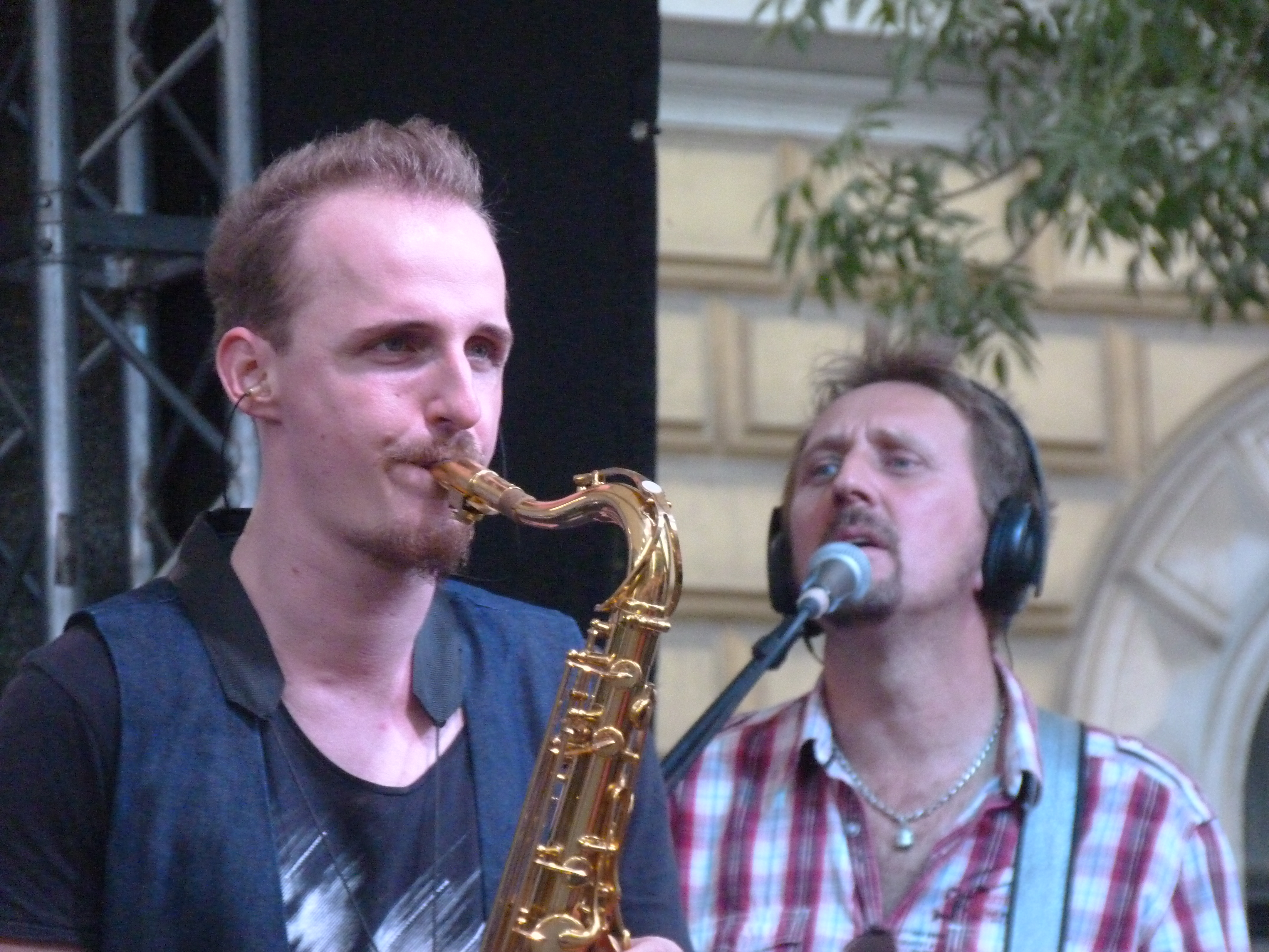 A felvétel 2014. szeptember 21-én vasárnap készült Budapesten, az Andrássy úton. Autómentes Nap. ©© Derzsi Elekes Andor, Budapest, 2014, A kép egészben, vagy részletekben másolását, bármilyen úton történő sokszorosítását és felhasználását a szerző ellenérték nélkül, jogutódjaira is kihatóan megengedi. Az engedély kiterjed a kereskedelmi célú hasznosításra is. Kéri azonban nevének feltüntetését a felhasználás során. A Metapolisz sorozat valamennyi képe és filmje Creative Commons alatti valamint kereskedelmi - for profit - célra is felhasználható. Ajánlott hivatkozás: Derzsi Elekes Andor: Metapolisz DVD line